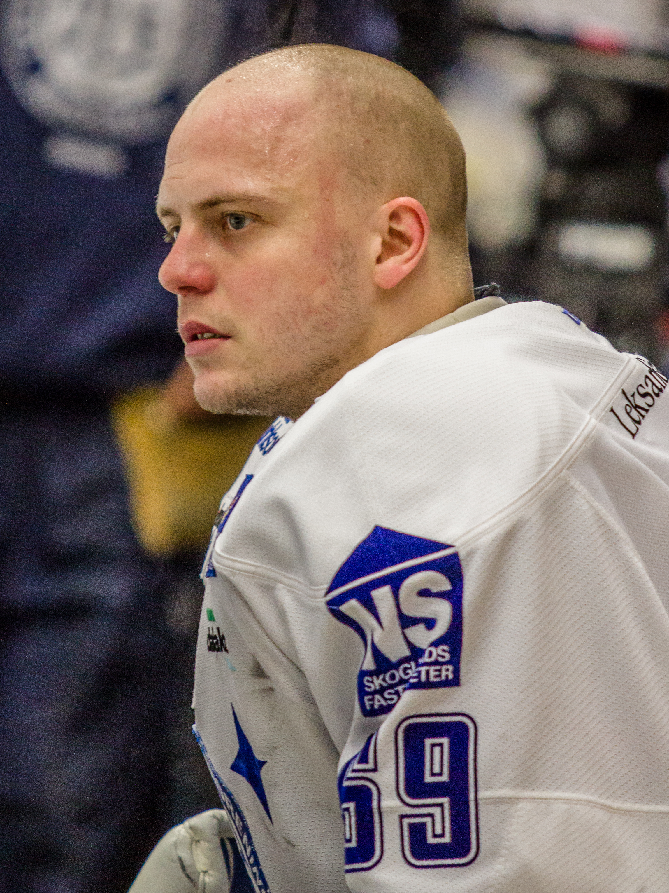 Oscar Alsenfelt i Leksands IF.